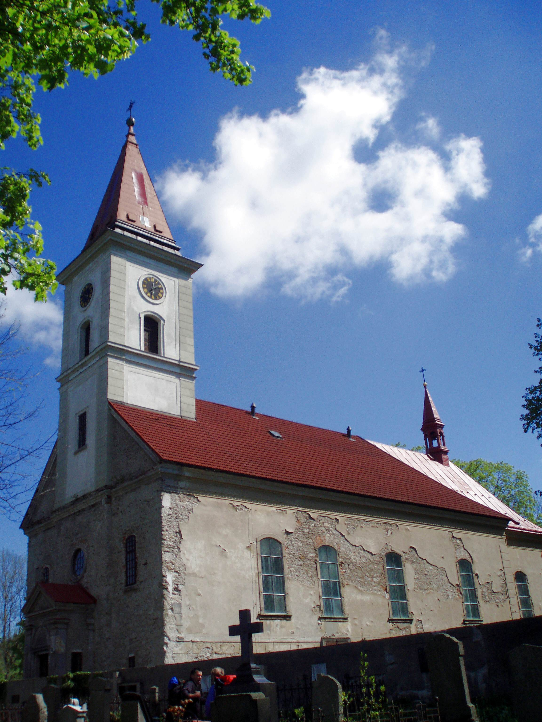 Kirche Oberpolaun